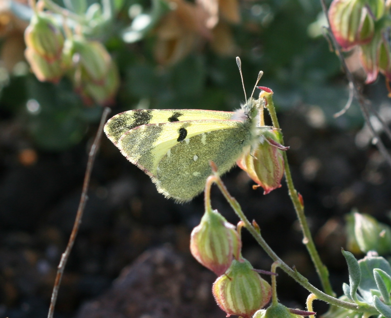 Taken near Montaña Roja, Playa Blanca, Lanzarote.